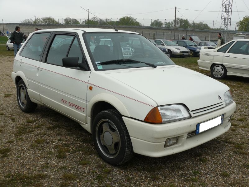 Français cadien: Montlhrey Avril 2012